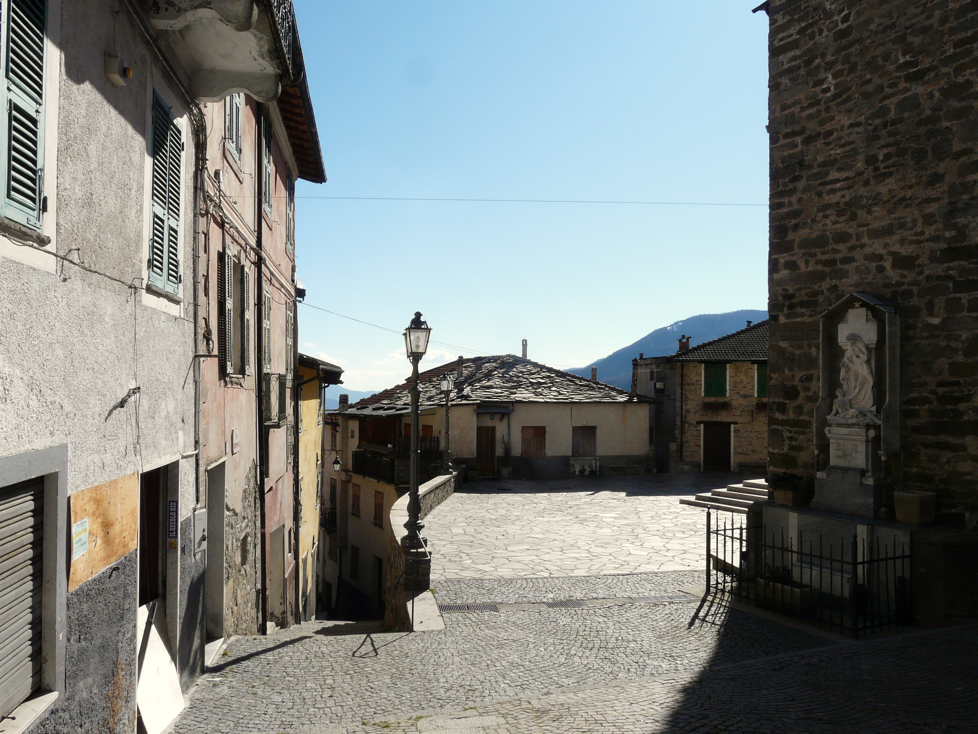 Mendatica, Liguria, Italia